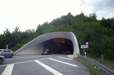 Saukopftunnel